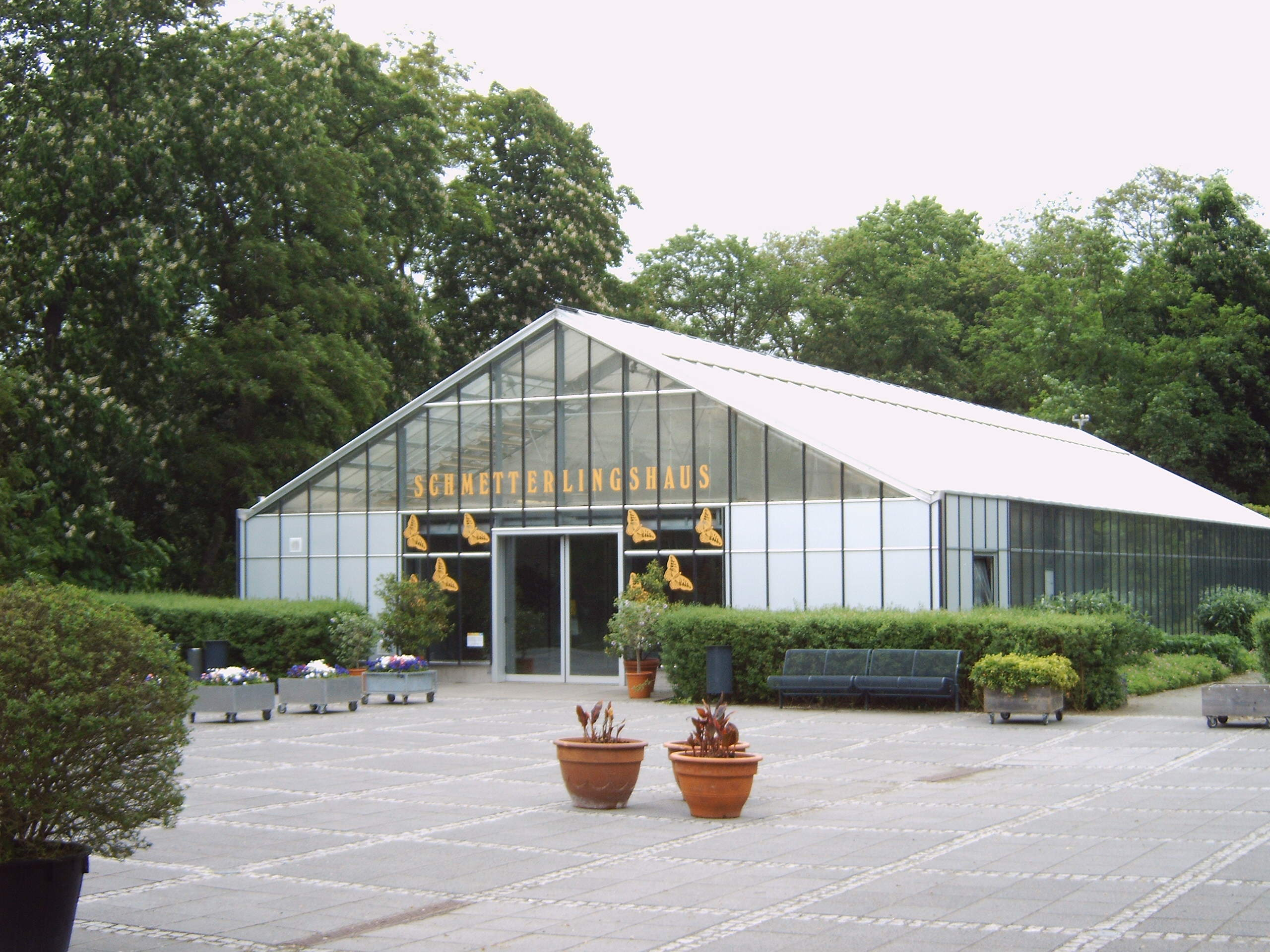 Schmetterlingshaus im Elbauenpark in Magdeburg Bild aufgenommen am 21.5.2006